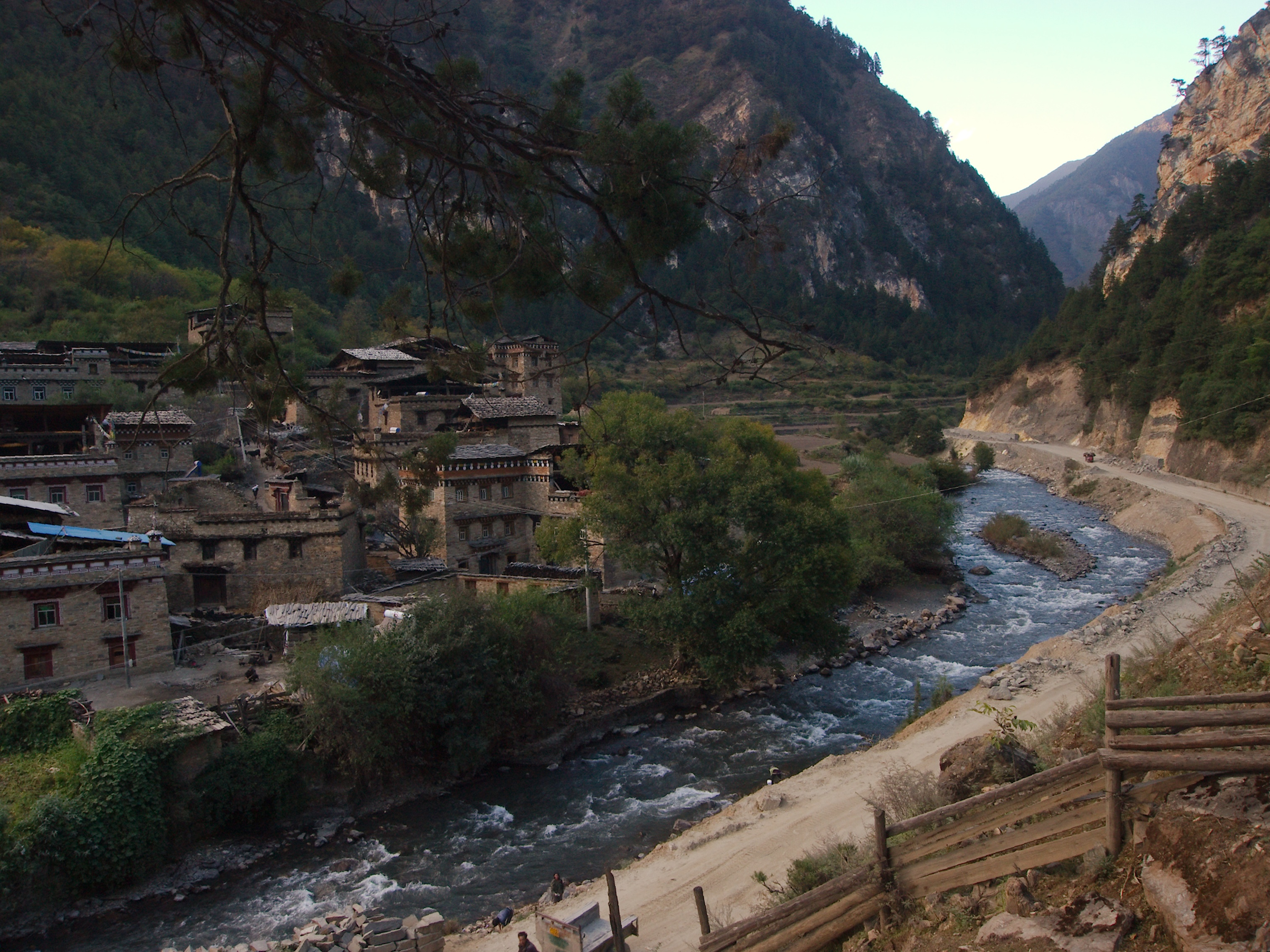 卡斯村 - Kasi Village - 2012.10